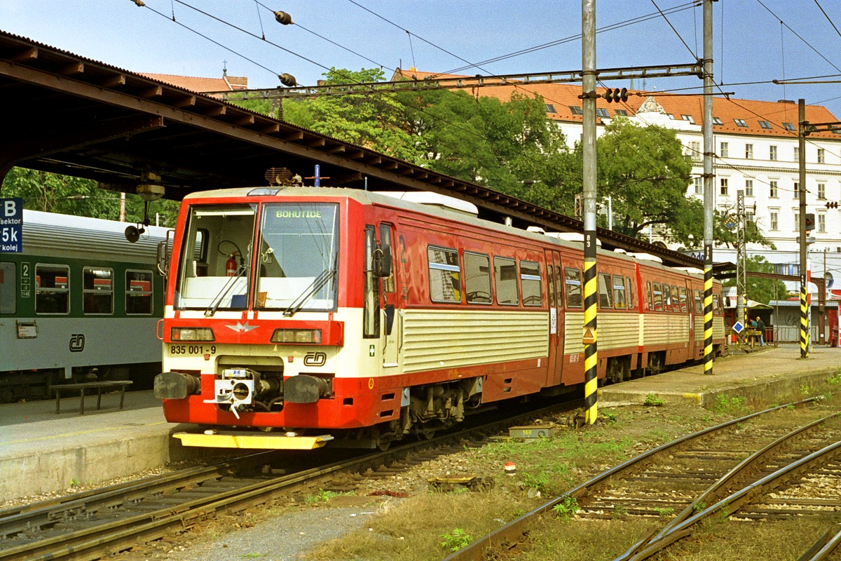 Motorová jednotka 835 001/201 v Brně